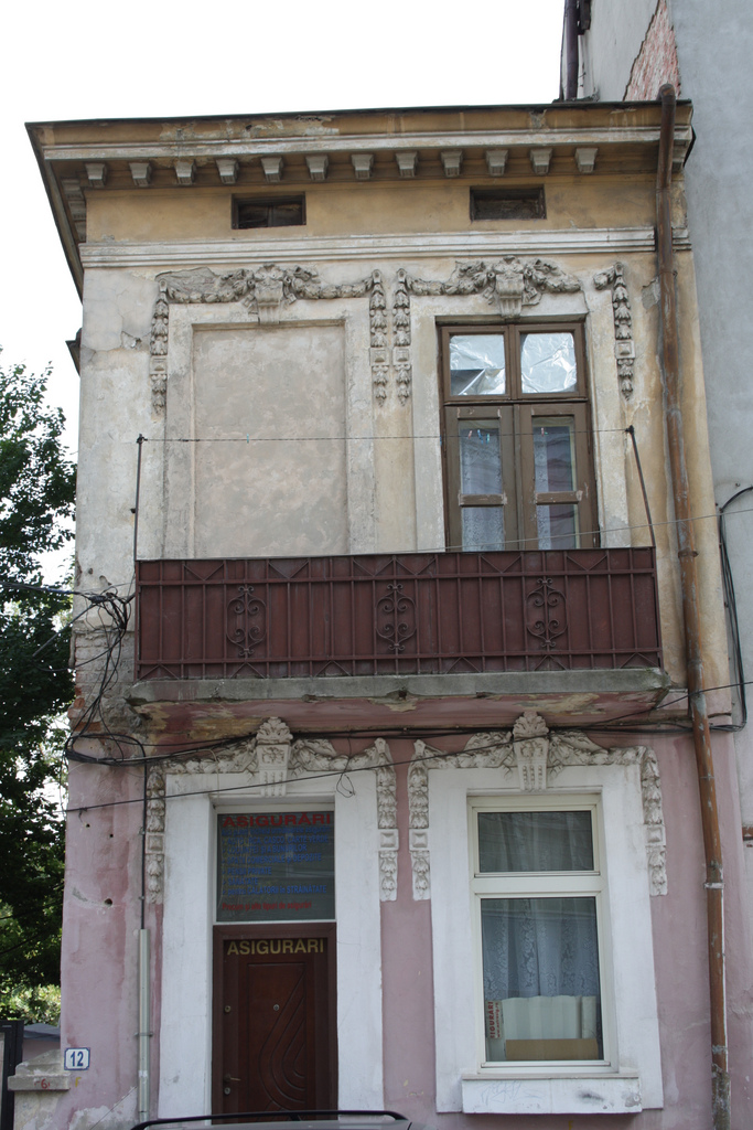 Casă, Str. Sevastopol 12 sector 1